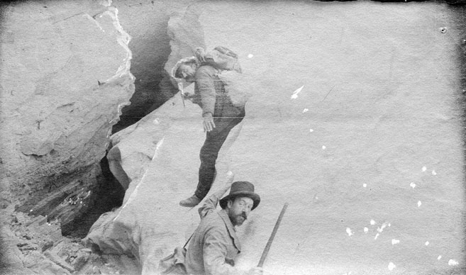 Fonds Trutat - Photographie ancienne Cote : TRU C 558 Localisation : Fonds ancien (S 30) Original non communicable Titre : Echelle de Tuquerouye, [Félix] Regnault et Henri Passet, octobre 1892 Auteur : Trutat, Eugène Rôle de l’auteur : Photographe Lieu de création : Tuquerouye (Hautes-Pyrénées) Date de création : 1892 Mesures : : 9 x 12 cm Observations : Notes de la main de E. Trutat : "hemisph. Darlot f. 11, papier en rouleau Eastman?" Retouches au crayon et au stylo rouge sur le négatif par E. Trutat Mot(s)-clé(s) : -- Montagne -- Pierre -- Sommet (montagne) -- Alpinisme -- Guide de montagne -- Automne -- Regnault, Félix -- Passet, Henri -- Mont-Perdu (Hautes-Pyrénées) -- Tuquerouye (Hautes-Pyrénées) -- Tuquerouye, Echelle de (Hautes-Pyrénées ; col) -- Tuquerouye, Refuge de (France) -- Midi-Pyrénées (France) -- Pyrénées (France) -- 19e siècle, 4e quart Médium : Photographies -- Négatifs sur papier -- Noir et blanc -- Eastman -- Scènes Bibliothèque de Toulouse. Domaine public